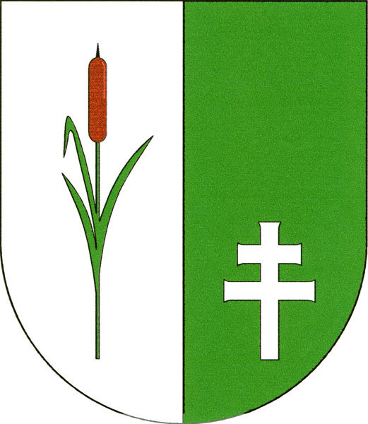 Znak obce Rohozec v okrese Brno-venkov